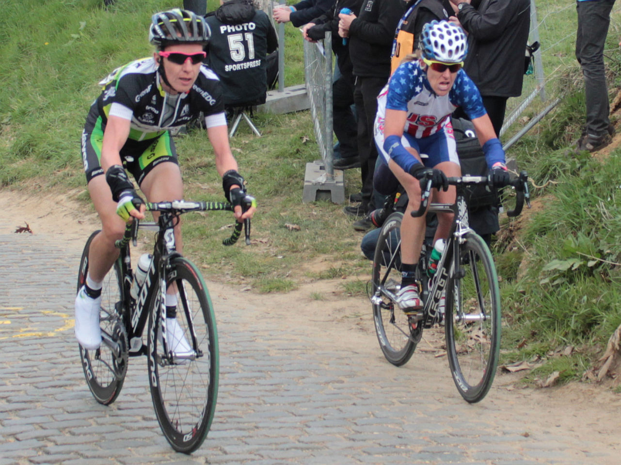 Judith Arndt & Kristin Armstrong attacking on the Oude Kwaremont; Ronde Van Vlaanderen voor Vrouwen 2012